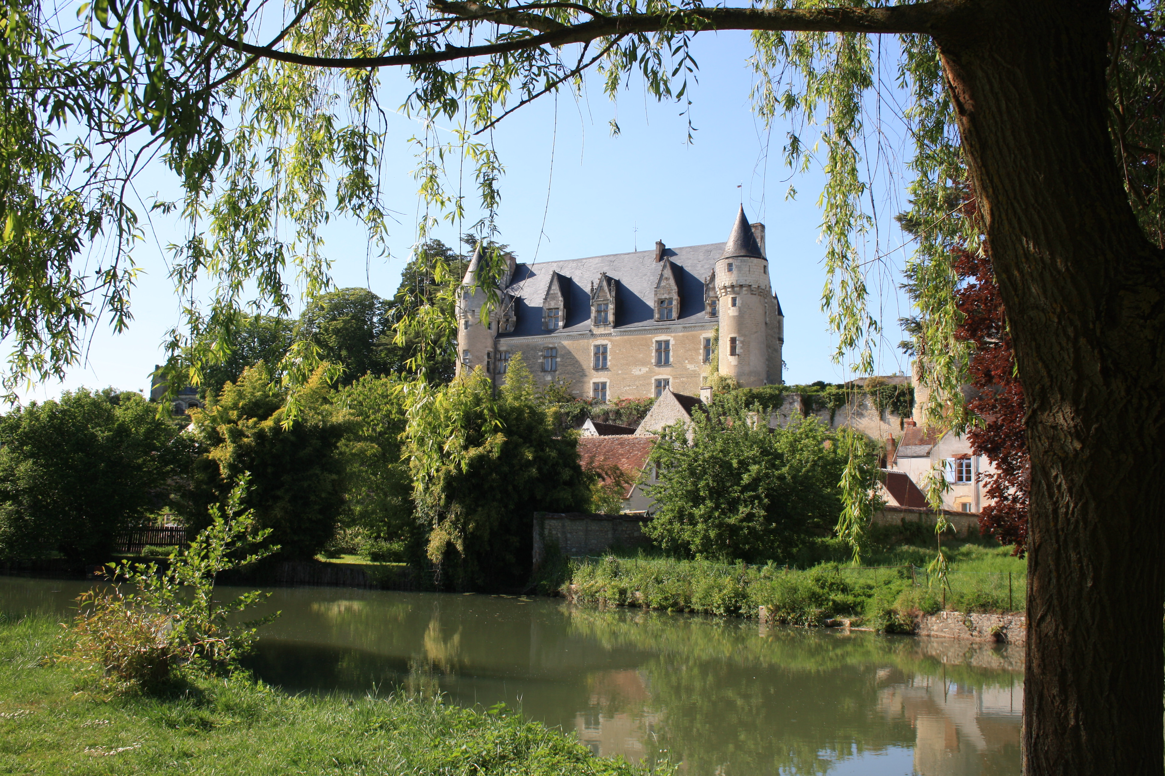 Vu des bords de l'Indrois . Montrésor , un des plus beaux villages de France! .